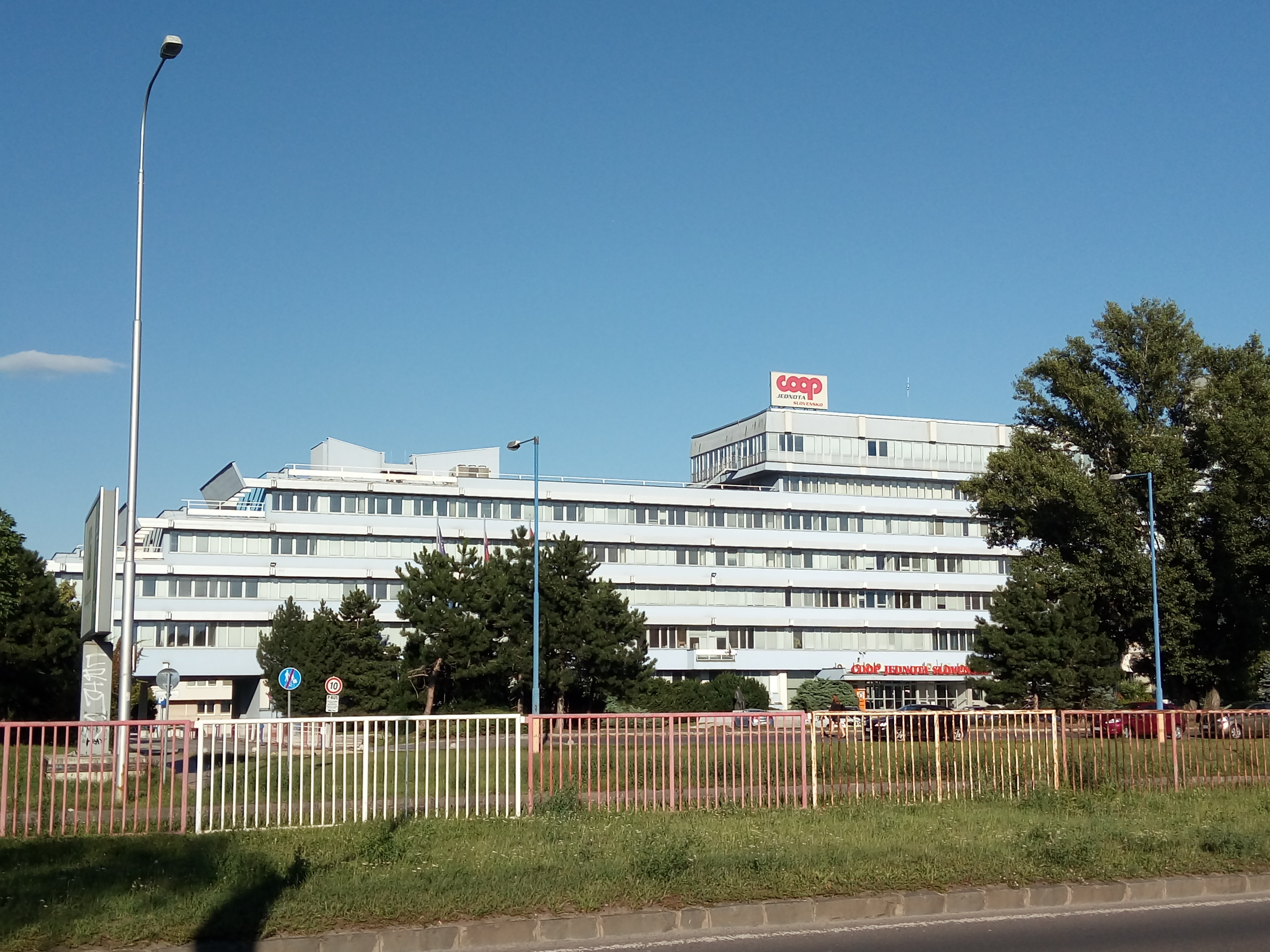 Bajkalská 25, Ružinov, Bratislava